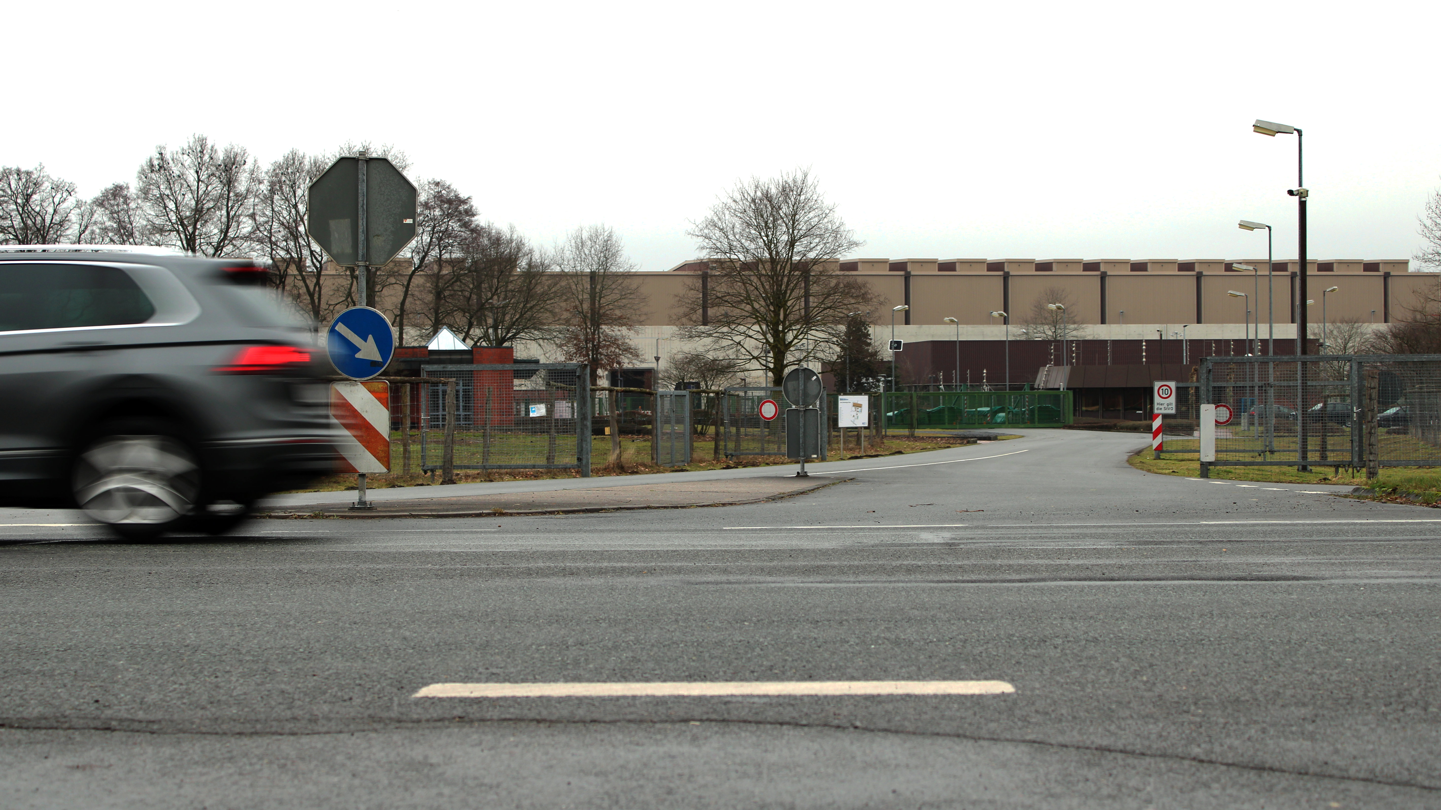 Transportbehlterlager Ahaus (2019) während des Baus einer neuen "Anti-Terror-Schutzwand".